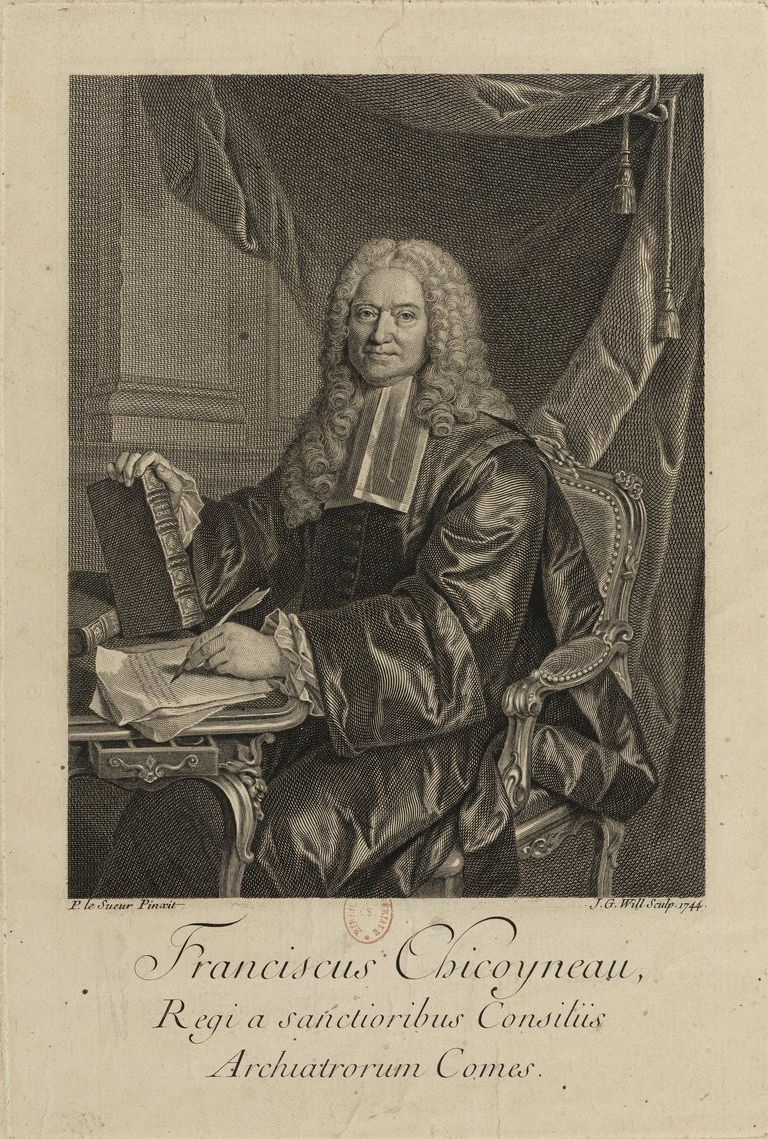 François Chicoyneau Archiâtres premier médecin du roi